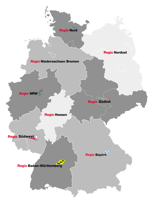 Karte der Regionen der Unternehmensstruktur der DB Regio AG.